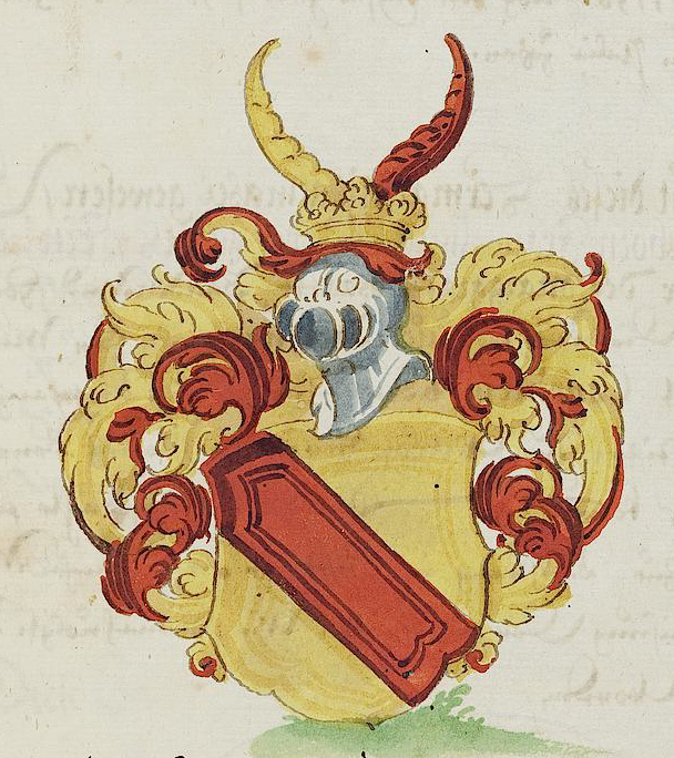 Wappen aus: David Wolleber: Chorographia Württemberg, [Schorndorf] 1591, Universitätsbibliothek Tübingen, Mh 6,1 Wappen Markgrafen zu Baden